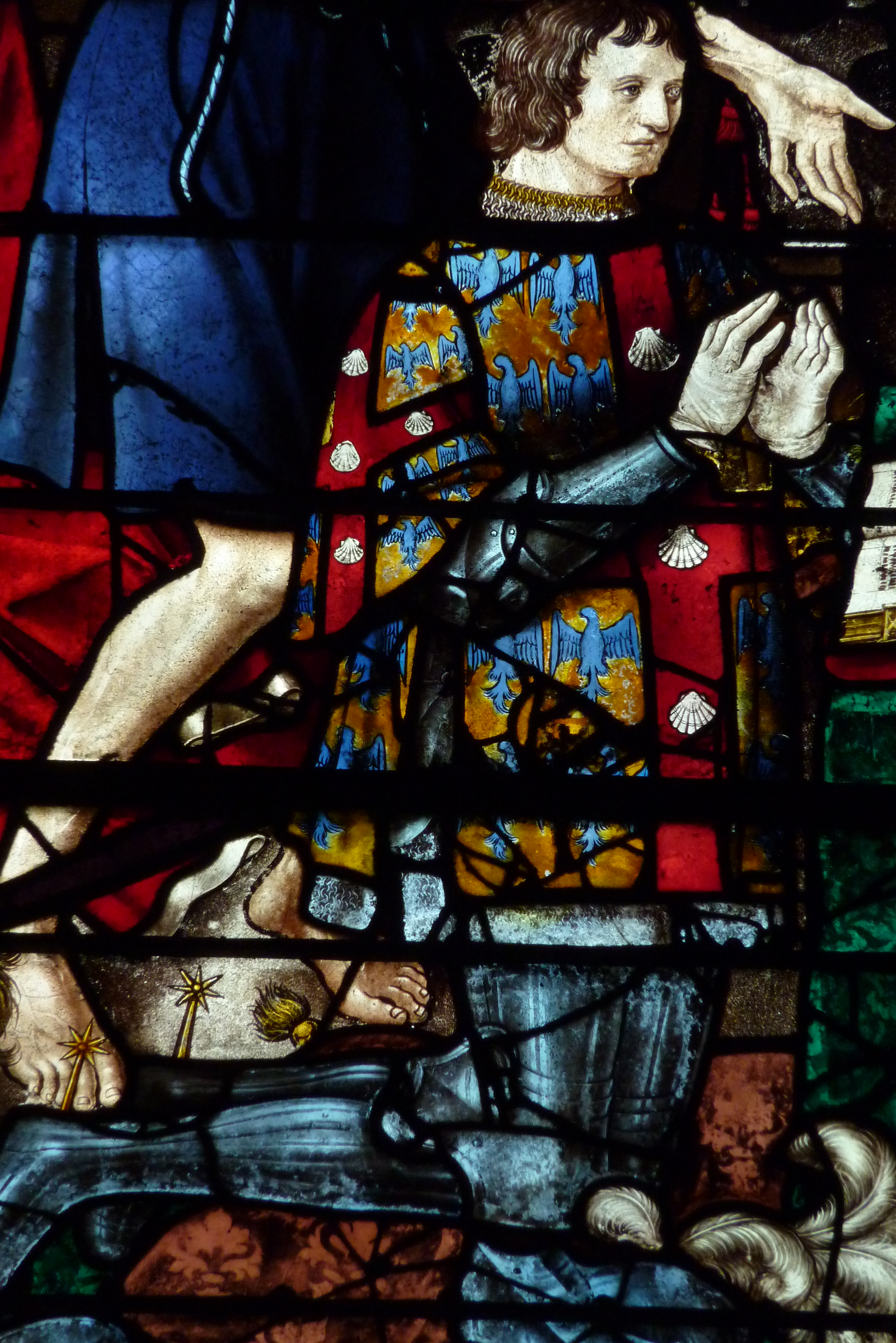 Ausschnitt des Bleiglasfensters Nr. 5 (16. Jahrhundert) in der katholischen Pfarrkirche Saint-Martin (Collégiale Saint-Martin) in Montmorency, Darstellung: Guy de Laval, Karton: Gauthier de Campes, Ausführung: Jean Chastelain (siehe: Dominique Foussard, Charles Huet, Mathieu Lours: Églises du Val-d'Oise. Pays de France, Vallée de Montmorency, Société d'Histoire et d'Archéologie de Gonesse et du Pays de France, 2. Auflage, Gonesse 2011, ISBN 9782953155426)